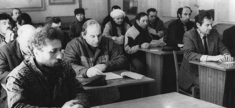 Устаноўчы сход Першаснай арганізацыі аб'яднання Незалежных прафсаюзаў гарнякоў (ОНПГ) СССР. 27 сакавіка 1991 г.